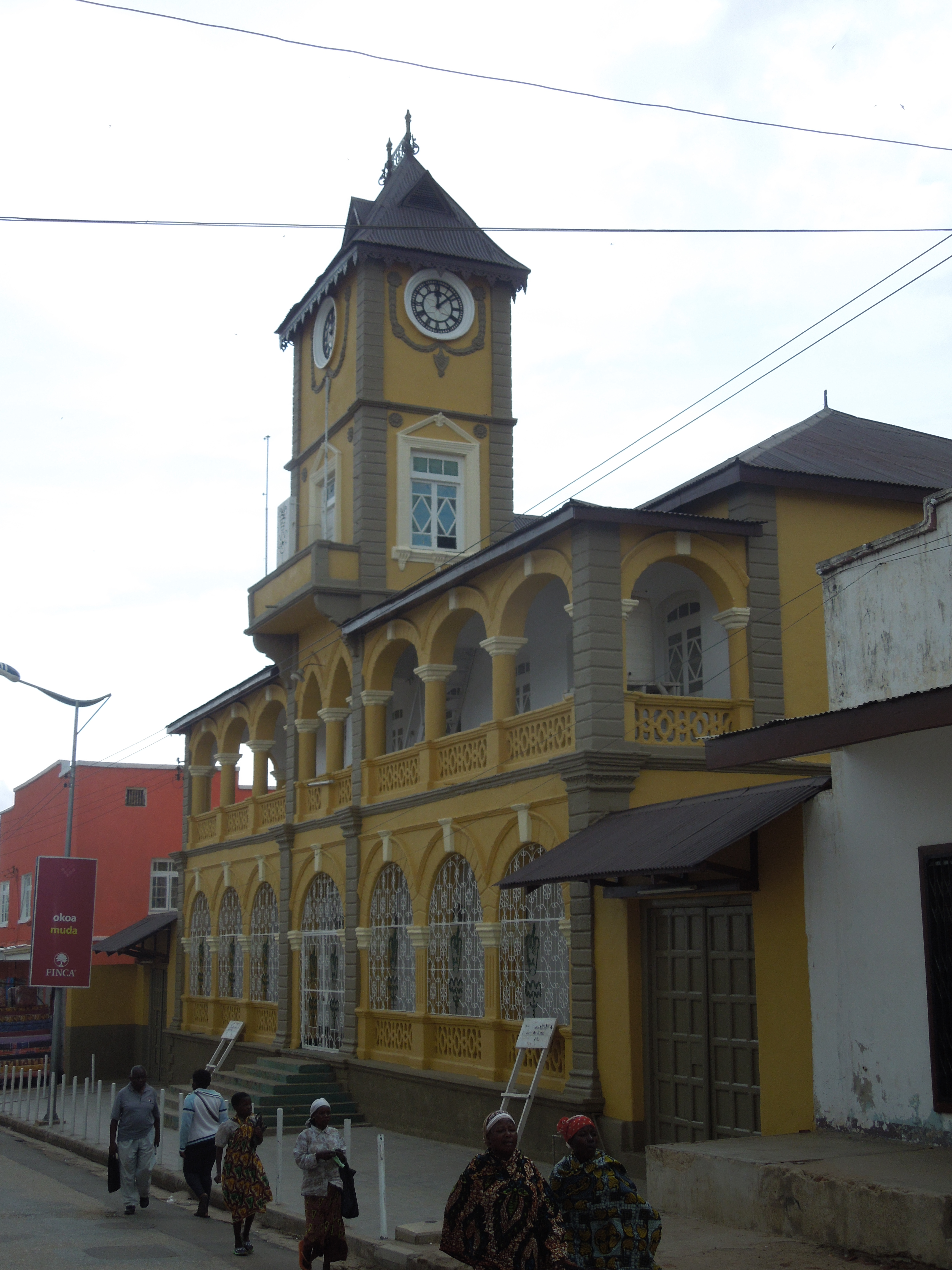 Deutsches Kolonial Gebäude in Iringa ehemals Groß Iringa